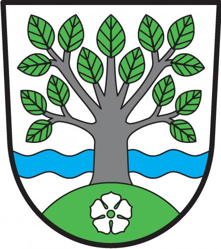 Nová Buková, znak obce